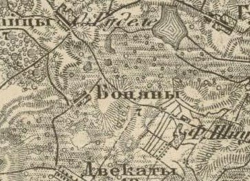 Деревня Боцяны (Бацёняй). Фрагмент карты Шуберта. Из комплекта топографических карт Ковенской губернии. 1860-1890 гг. Масштаб: 3 версты в дюйме. (1 см-1260м) .(1:126000)